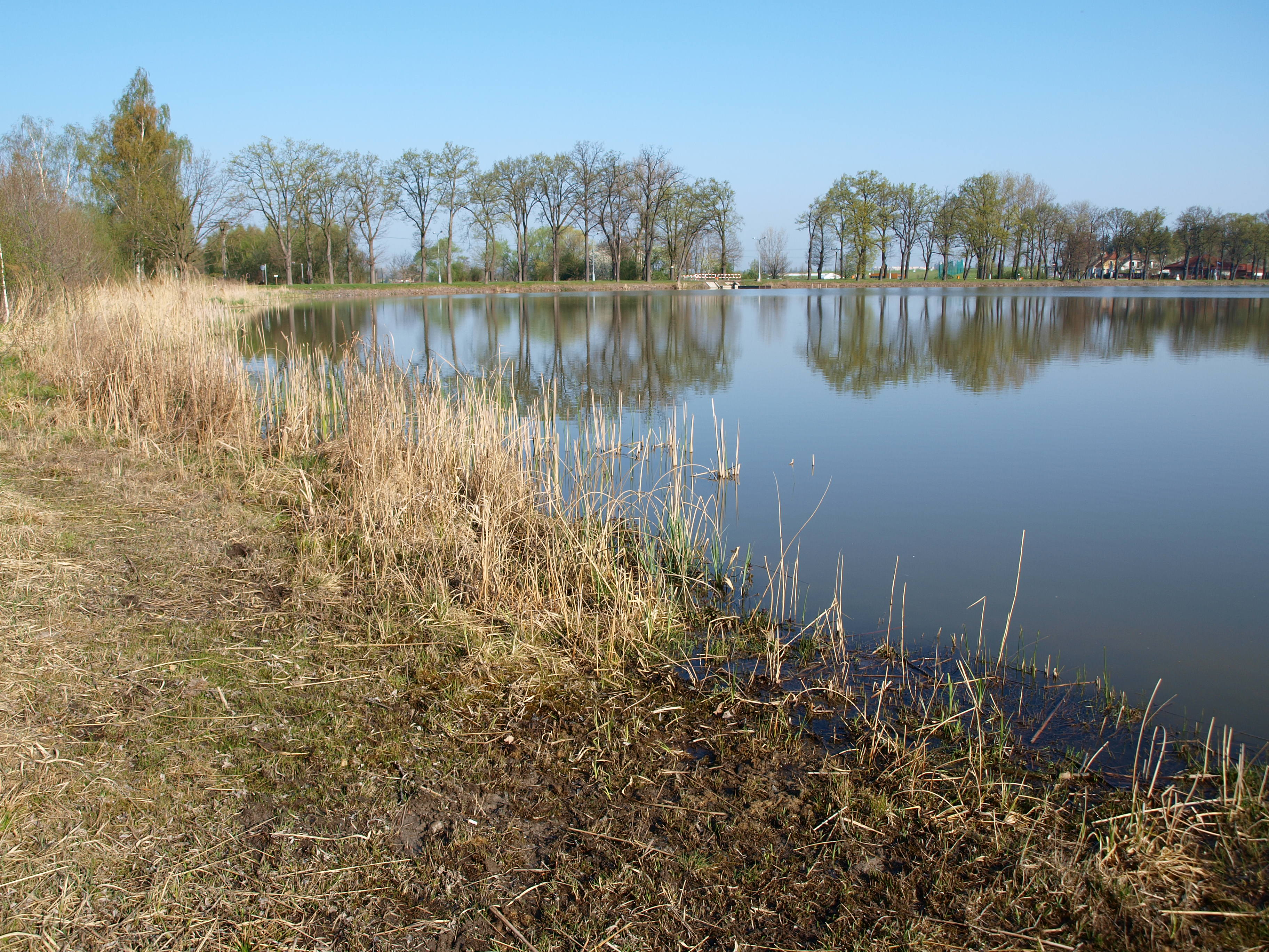 Litorální pásmo rybníka Roudnička, pohled ke hrázi se silnicí, duben 2011.